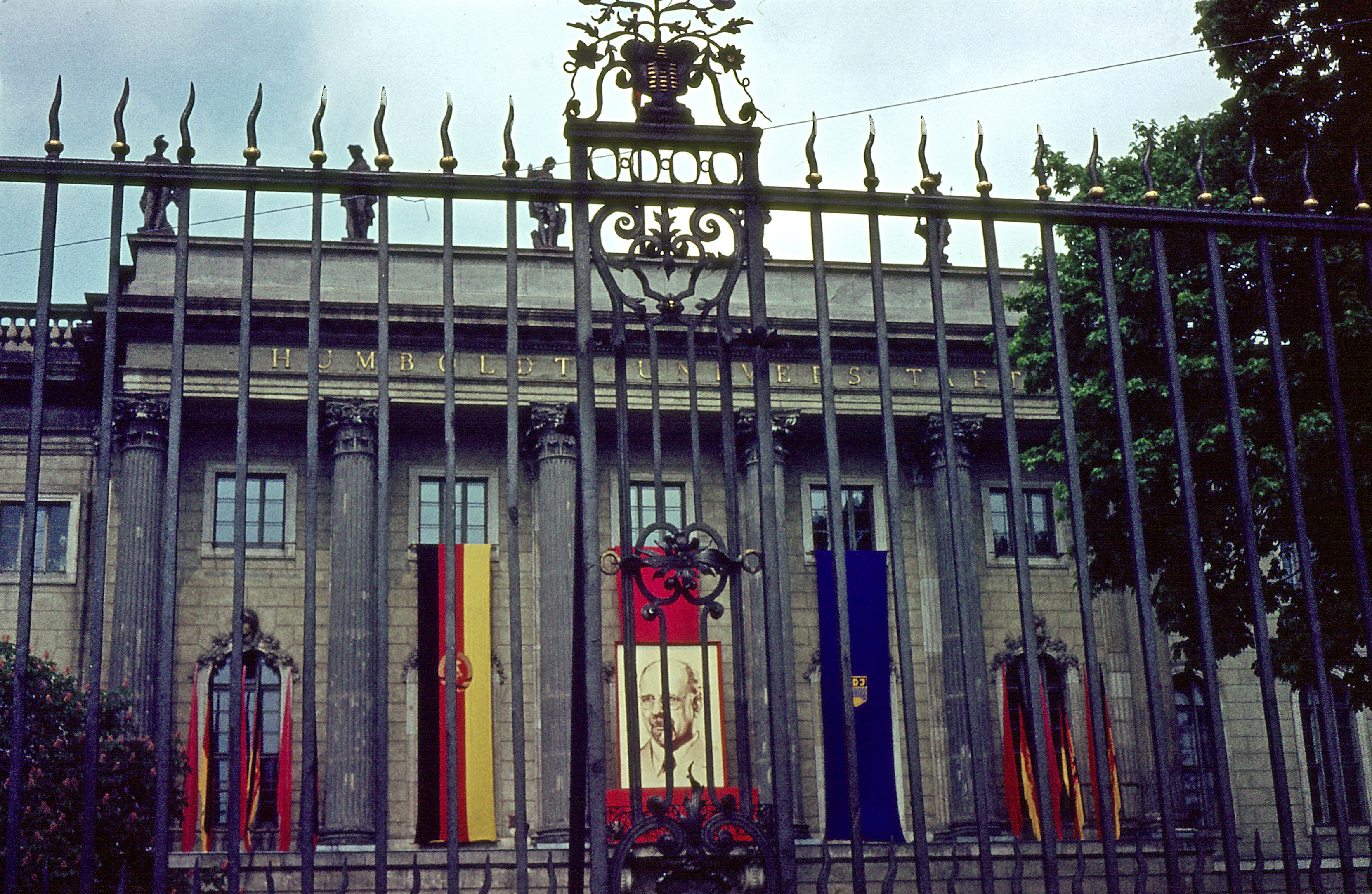 The Humboldt Universitaet building at Unter den Linden, Berlin in 1964